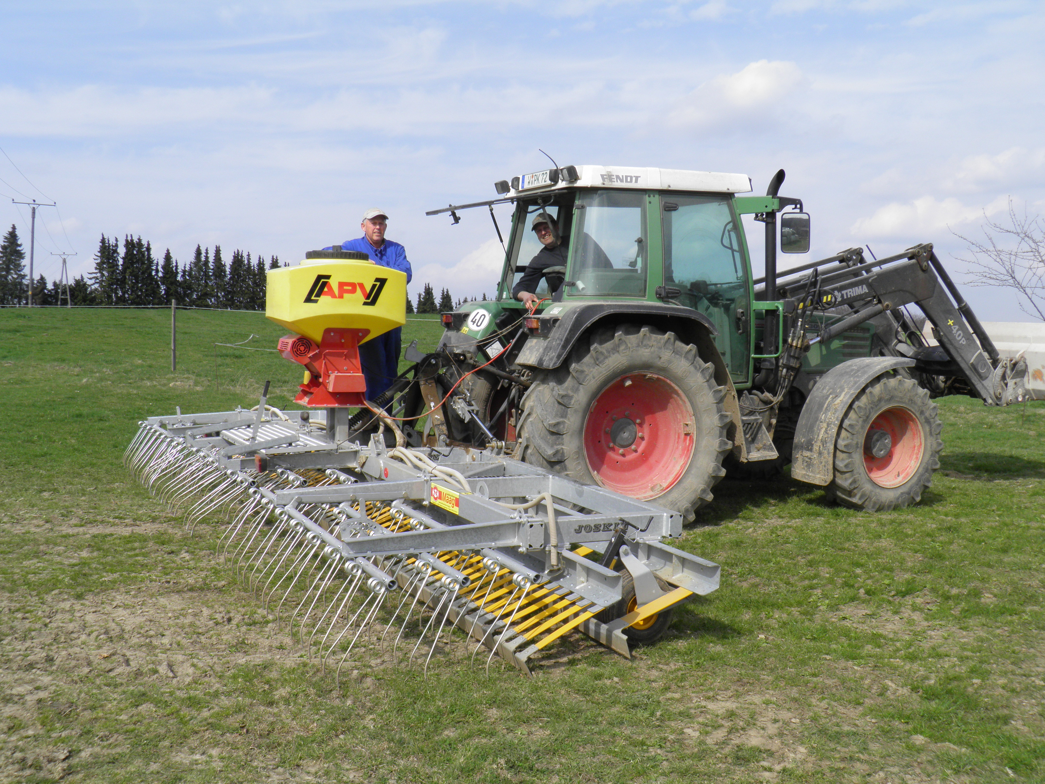 Weidelüfter in Frielinghausen (Wuppertal)